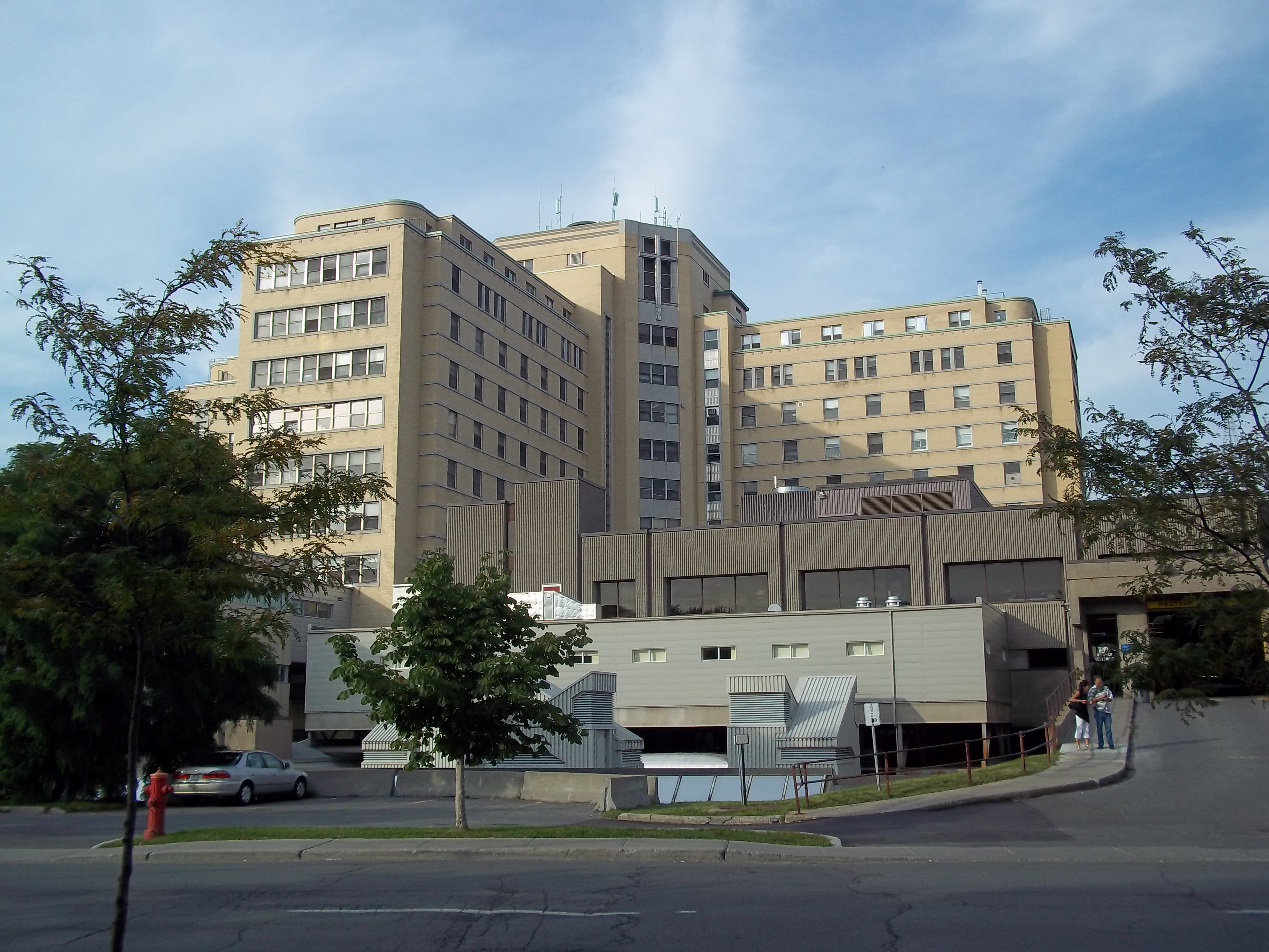 Hôpital Maisonneuve-Rosemont, 5345, boulevard de l'Assomption, Montréal